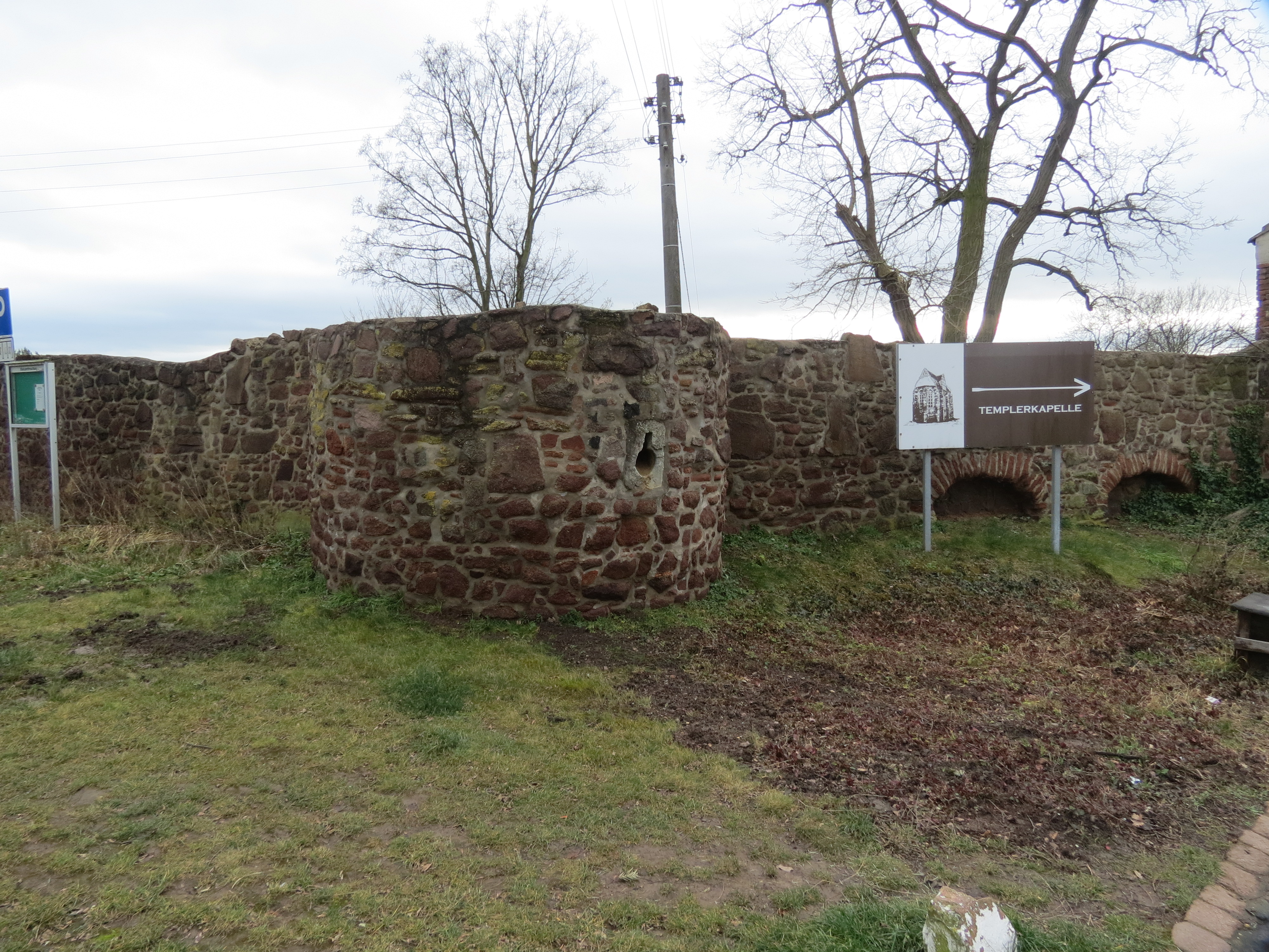 Mücheln, Wettin-Lobejün, Sachsen-Anhalt, Eingangsbereich zur ehemaligen Templerkommende, Rest des Ecktürmchens mit Schießscharten